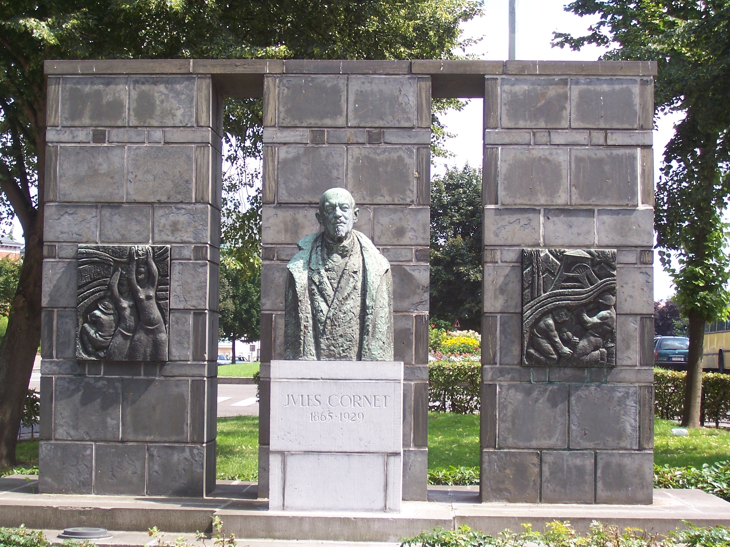 Mons (Belgique) - Monument en l'honneur de Jules Cornet (1865-1929), géologue montois.Le mémorial est dû à l'architecte Pepermans et au sculpteur Elström. Il fut élevé en 1953 au lieu montois dit : la Porte des Guérites (près des machines à eaux).